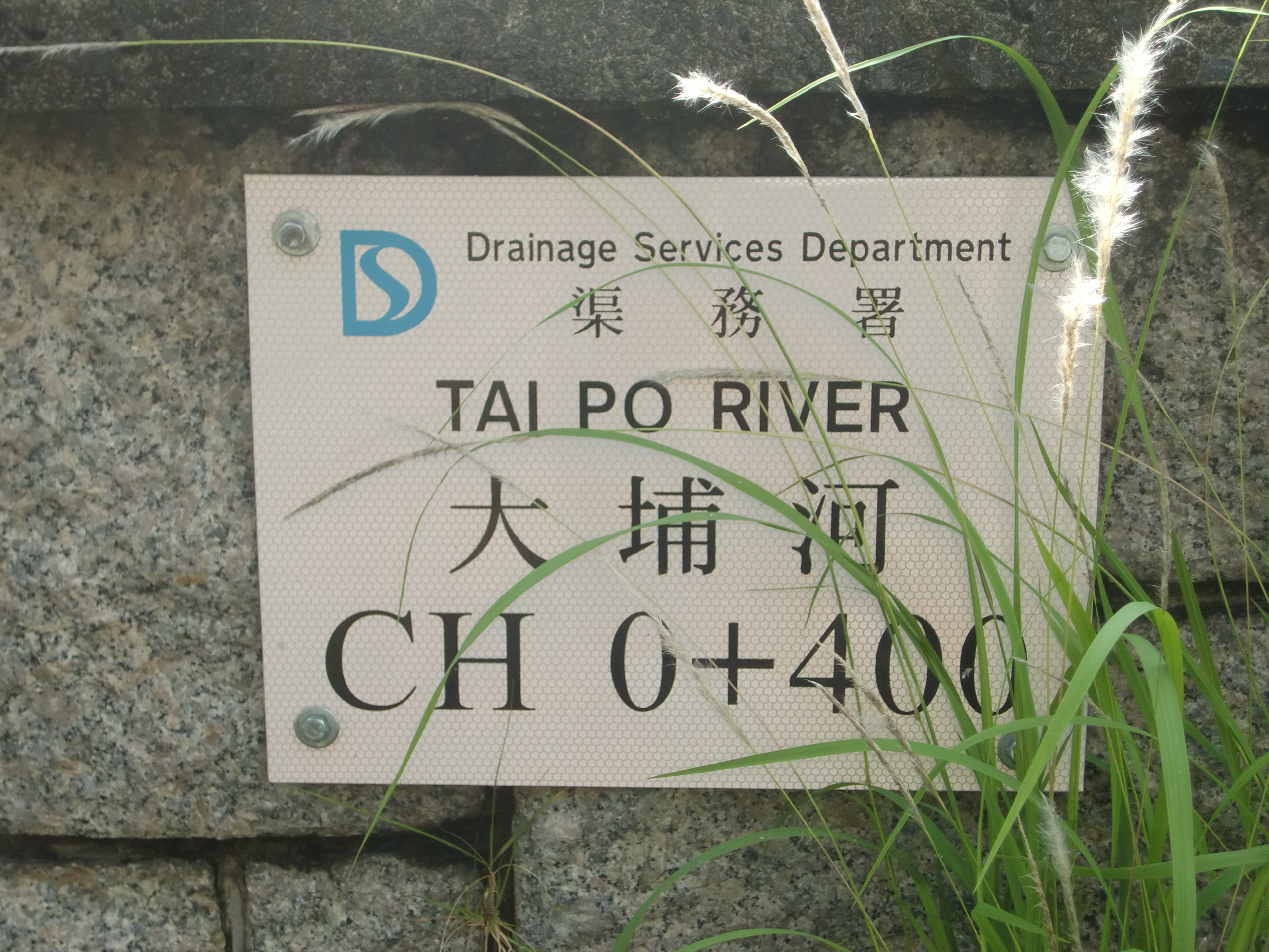 粵語: 大埔河邊里程牌